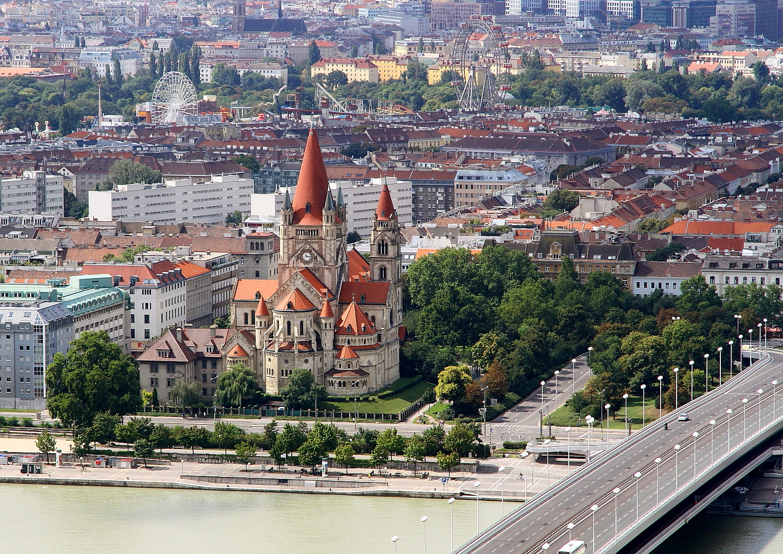 Der Mexikoplatz mit der Franz-von-Assisi-Kirche (Mexikokirche) vom linken Donauufer aus gesehen.